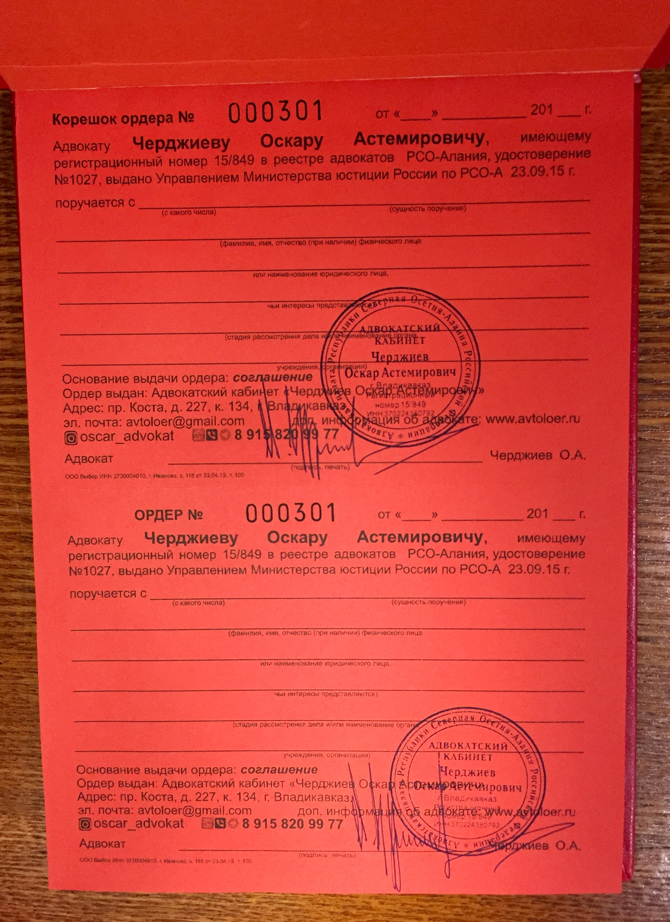 Незаполненный корешок ордера и ордер адвоката с его личной печатью и подписью.